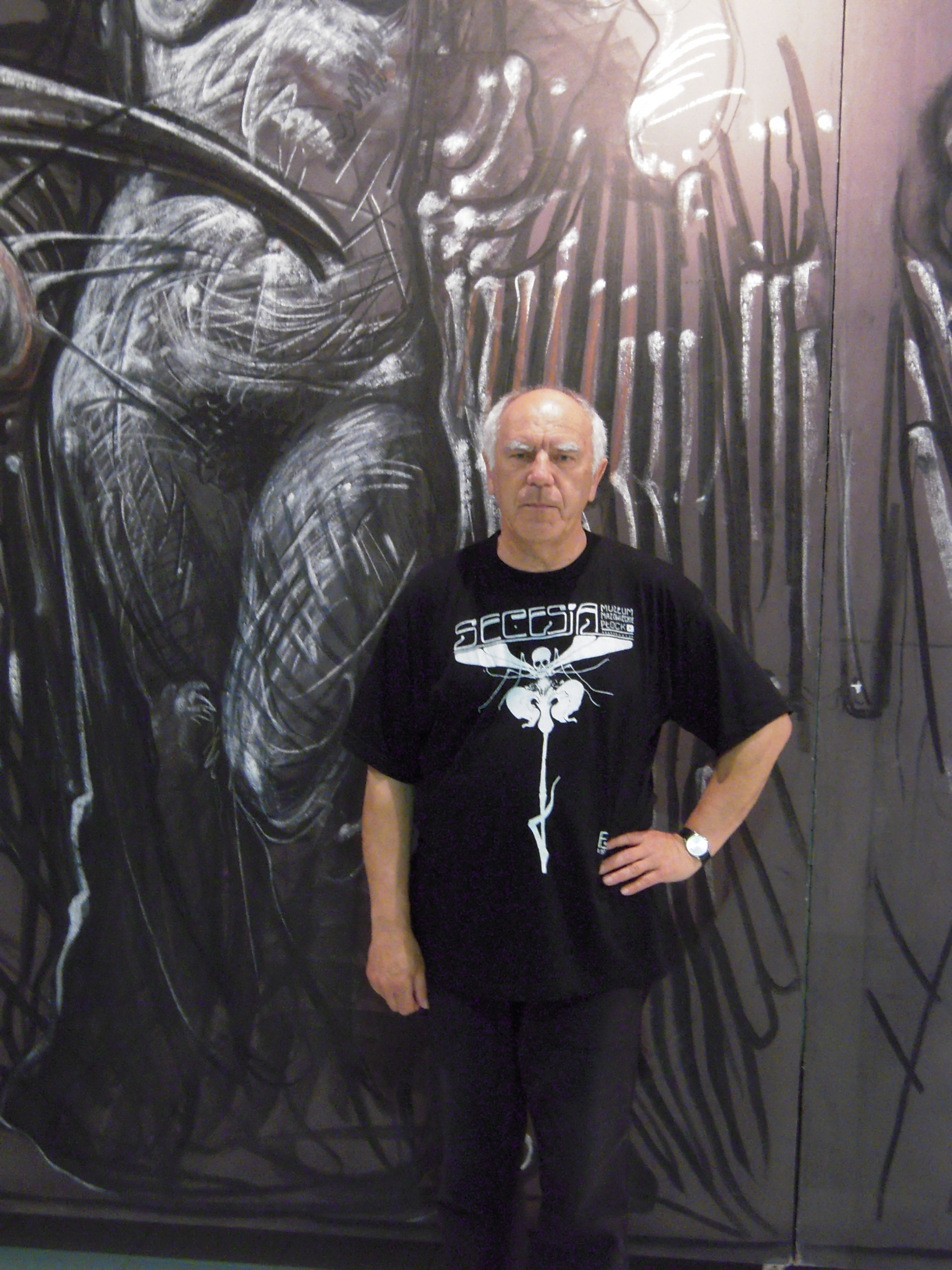 Tadeusz Zaremba, 2010